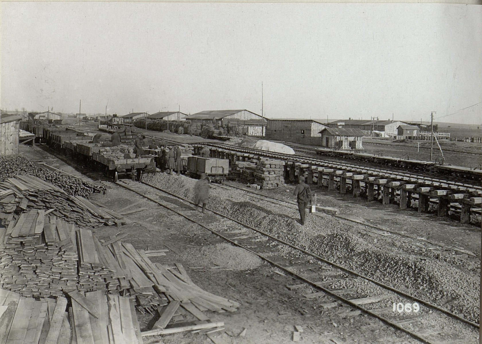 Etappenstationen und Verladebahnhöfe der vierten k.u.k. Armee wahrscheinlich in der Umgebung von Kowel